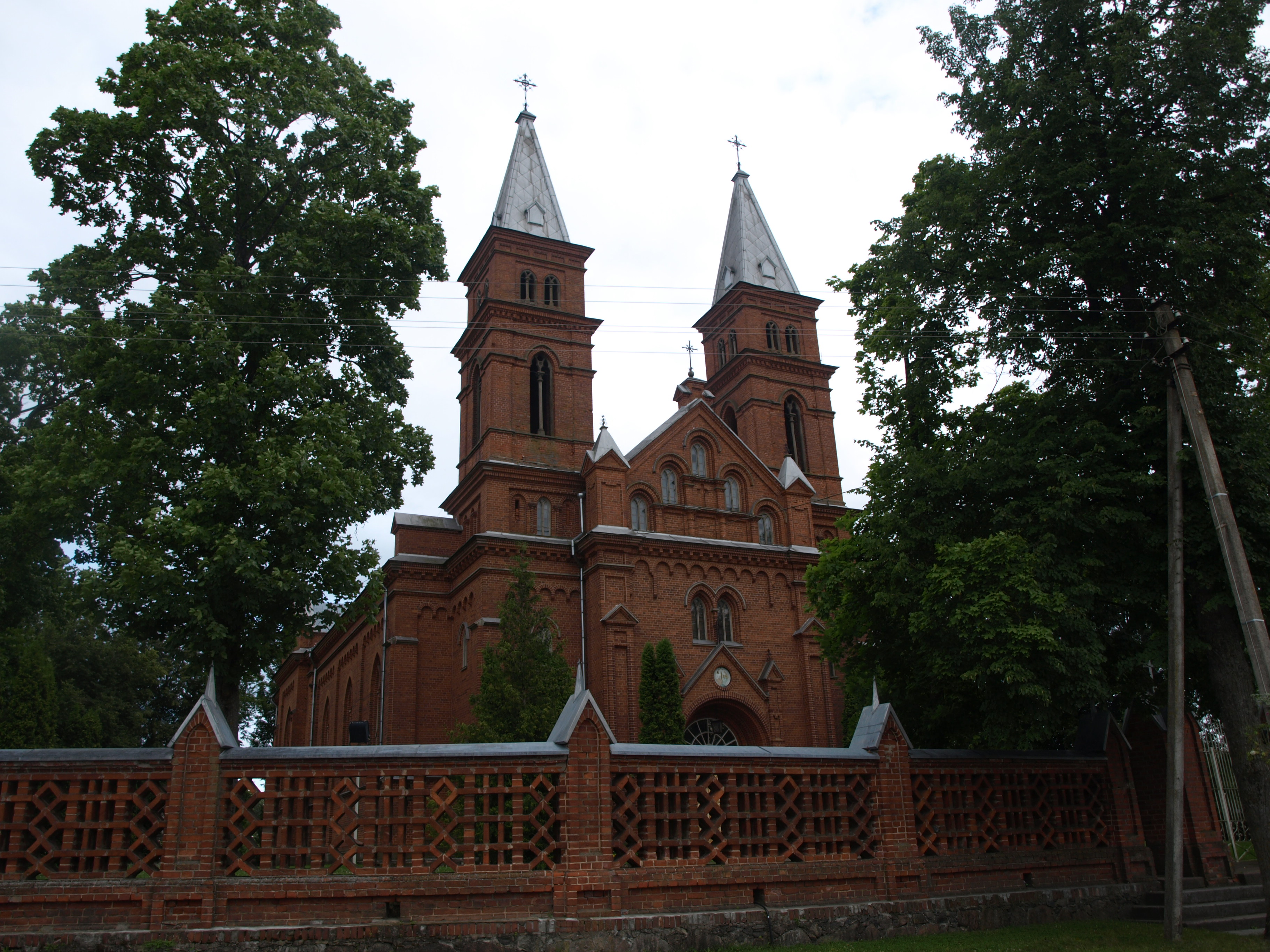 Uzpaliai church